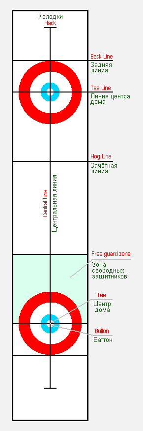 Площадка для кёрлинга